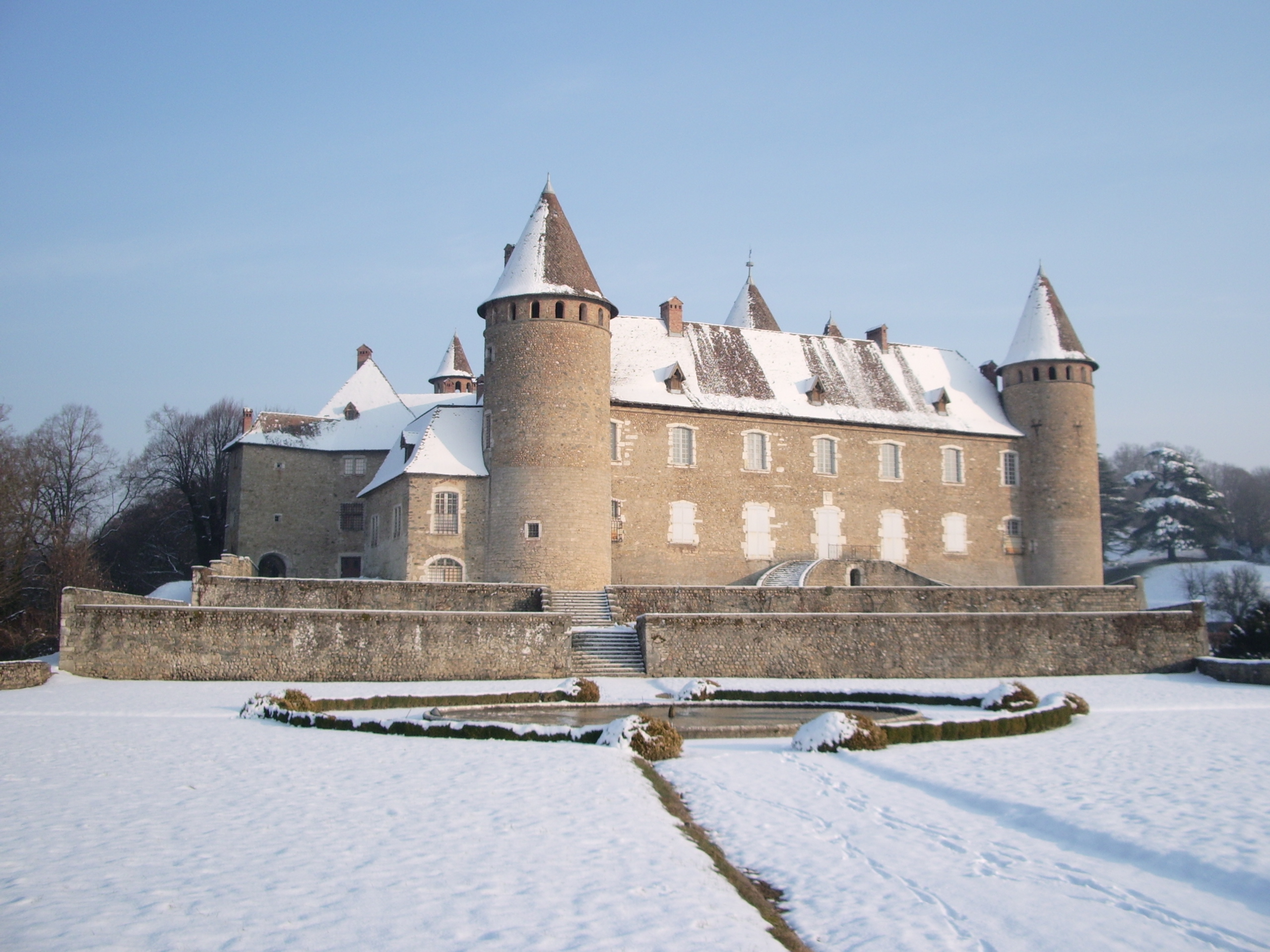 Château de Virieu (Isère, France)